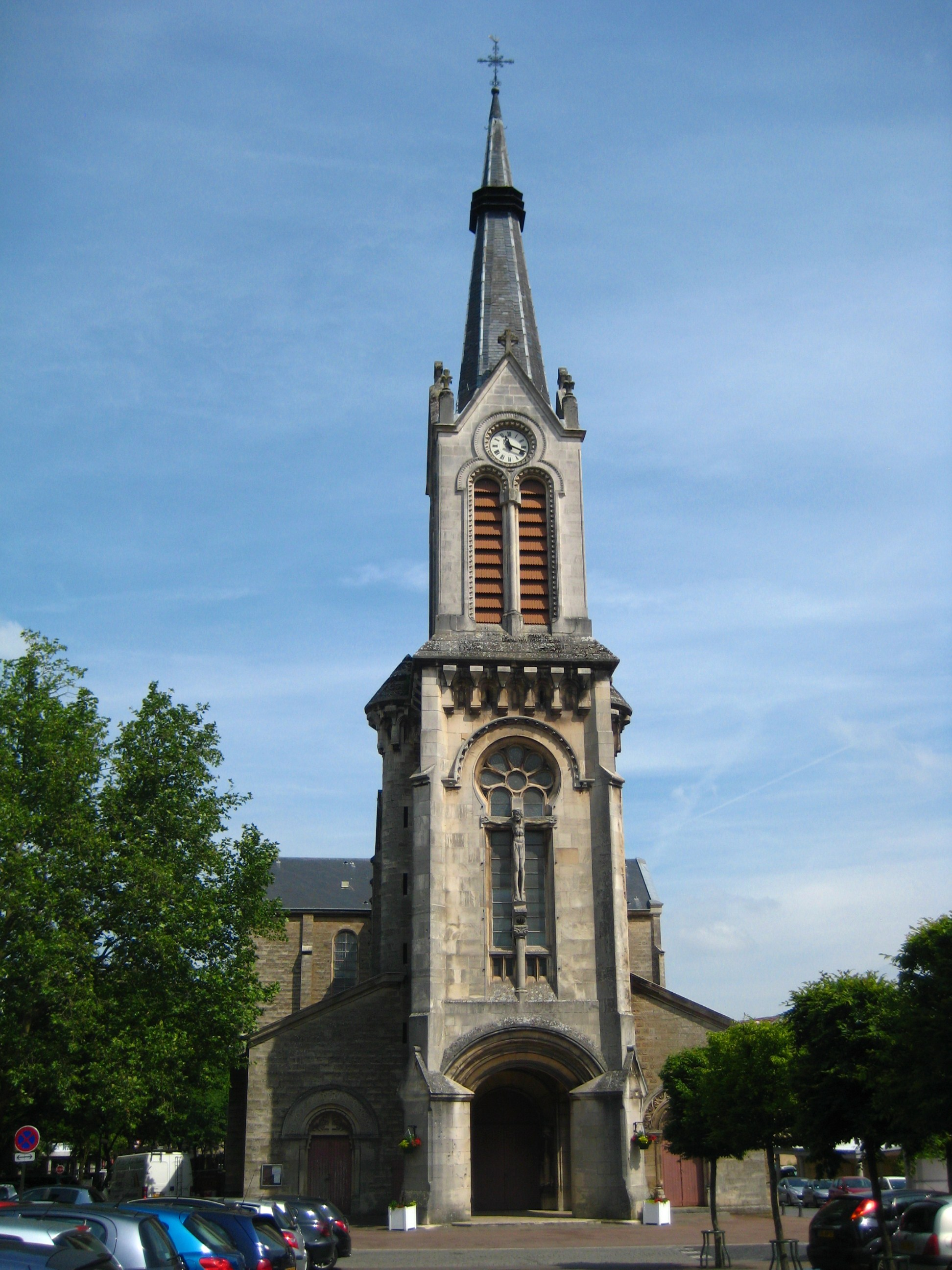 Description Nouvelle église paroissiale de la-Nativité-de la-Vierge de Villerupt Date25 June 2009Sourcemon appareil photoAuthorAimelaime Nouvelle église paroissiale de la-Nativité-de la-Vierge de Villerupt